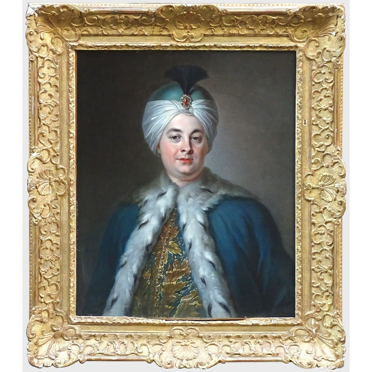 Portrait d’Henri-Louis Cain (1729-1778), dit Lekain.